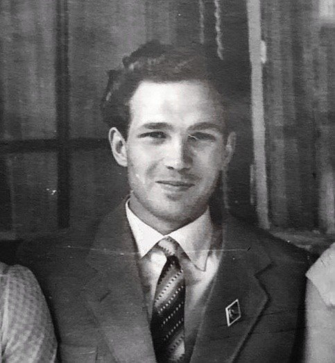 Евгений Петрович Горбунов